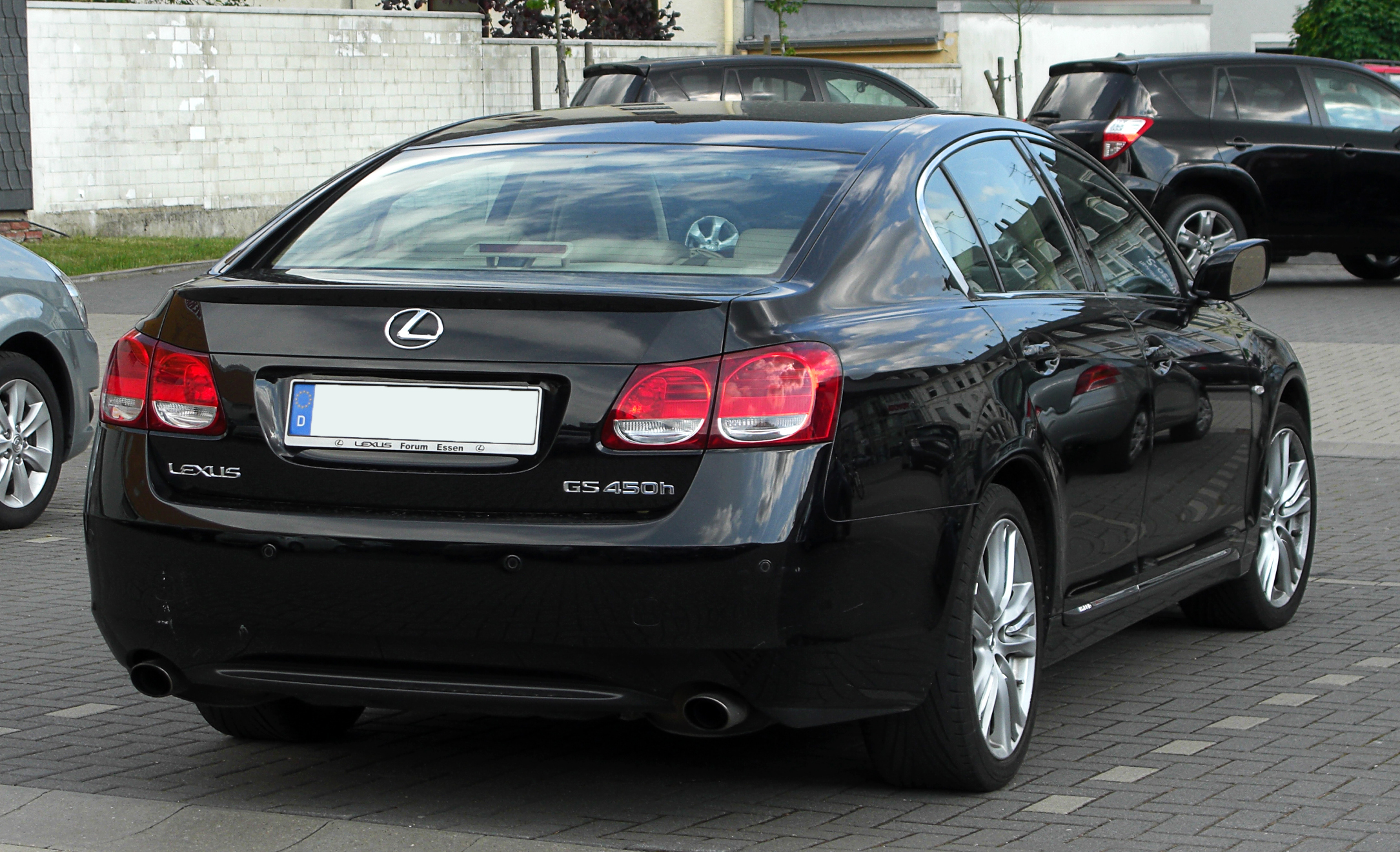 Lexus GS 450h (III)